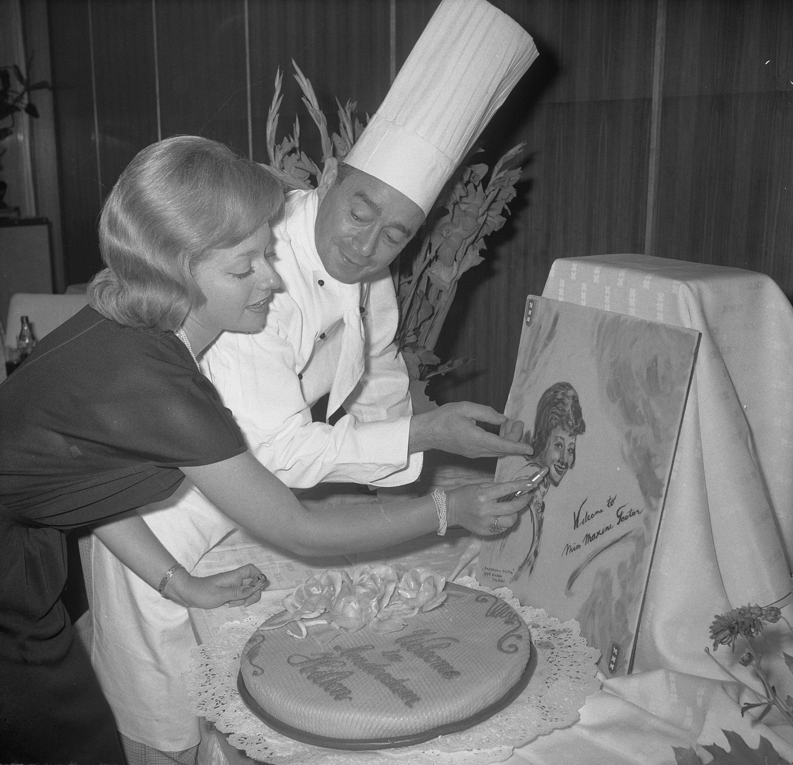 Collectie / Archief : Fotocollectie Anefo Reportage / Serie : [ onbekend ] Beschrijving : Dochter van Max Factor in ons land Datum : 12 september 1963 Instellingsnaam : Hilton Hotel Fotograaf : Nijs, Jac. de / Anefo Auteursrechthebbende : Nationaal Archief Materiaalsoort : Negatief (zwart/wit) Nummer archiefinventaris : bekijk toegang 2.24.01.03 Bestanddeelnummer : 915-5205